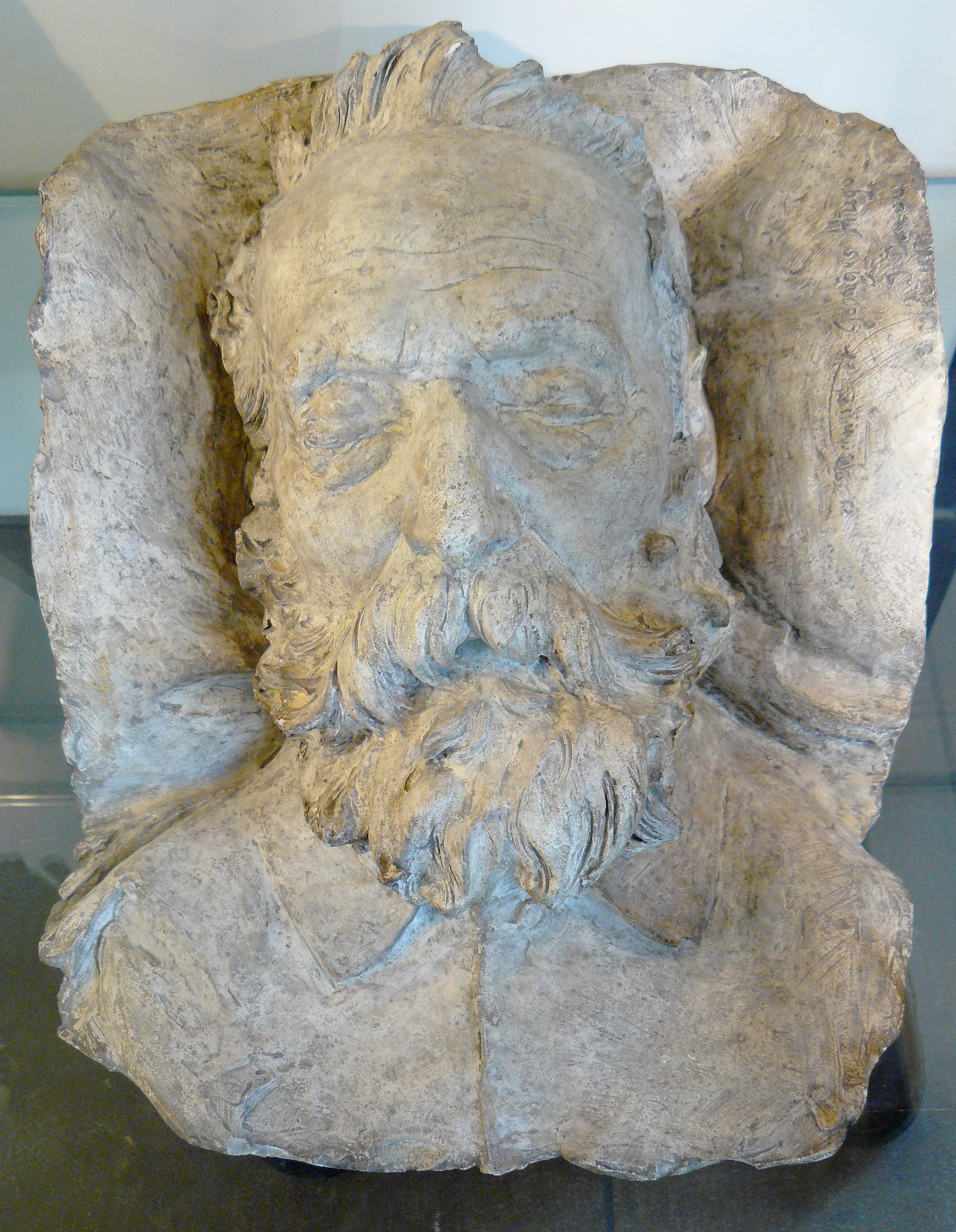 Victor Hugo sur son lit de mort, Jules Dalou, 25 mai 1885, plâtre dédicacé à Jeanne et Georges Hugo - Musée d'Orsay (Paris), n° 2038